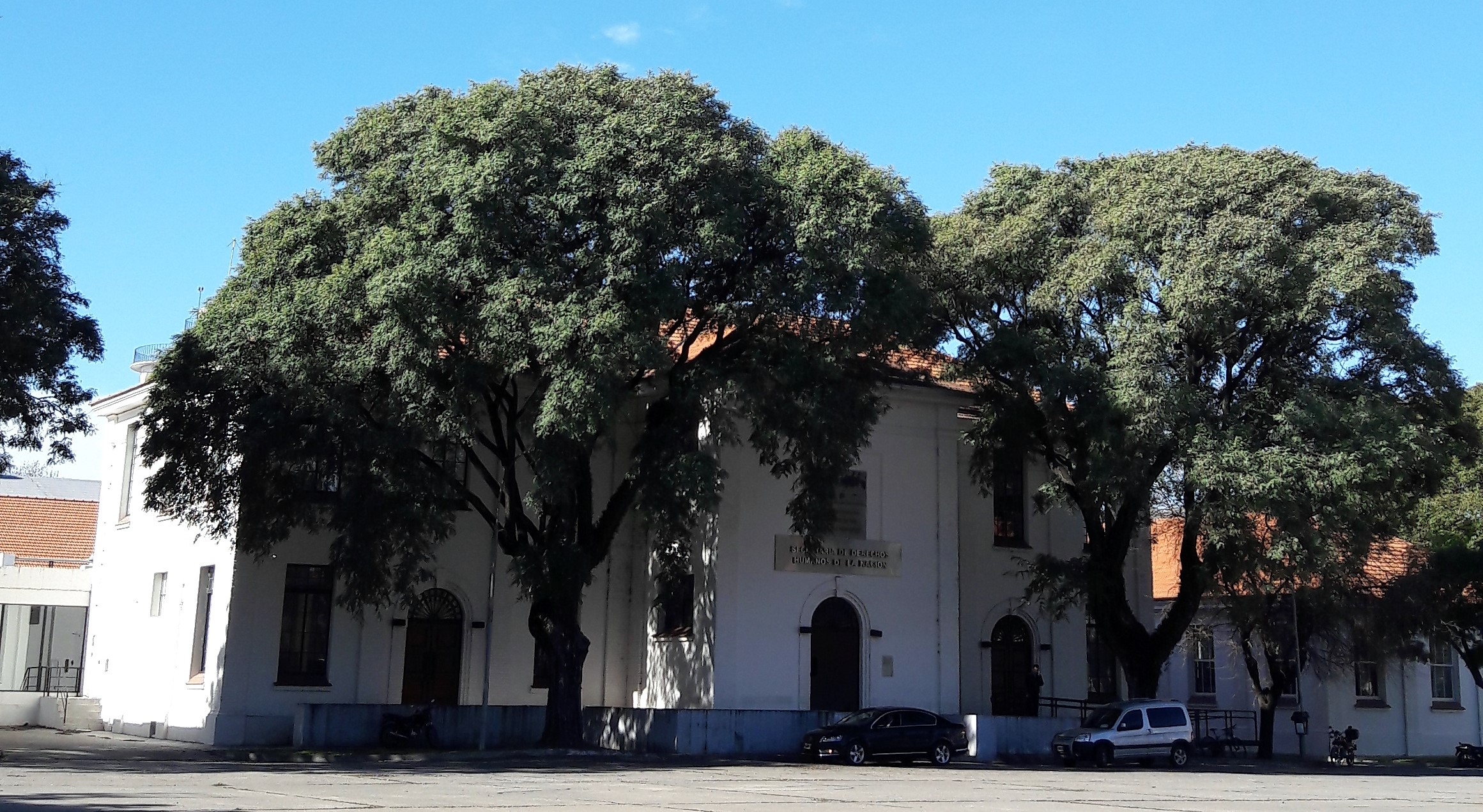 Sede de la Secretaría de Derechos Humanos en la ESMA.